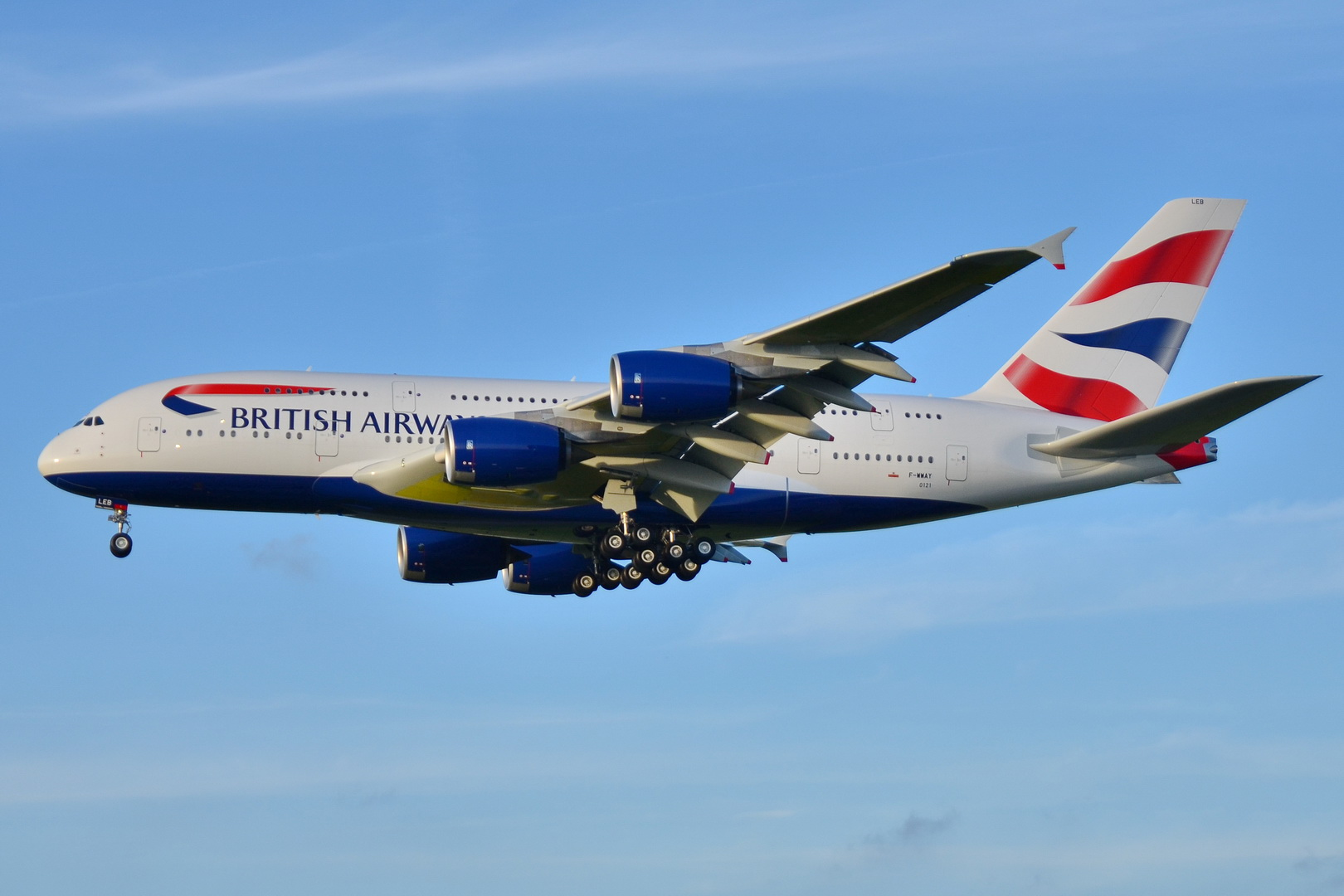 Photo prise à l'aéroport de Toulouse-Blagnac (LFBO) en France. Picture take at Toulouse-Blagnac Airport (LFBO) in France.